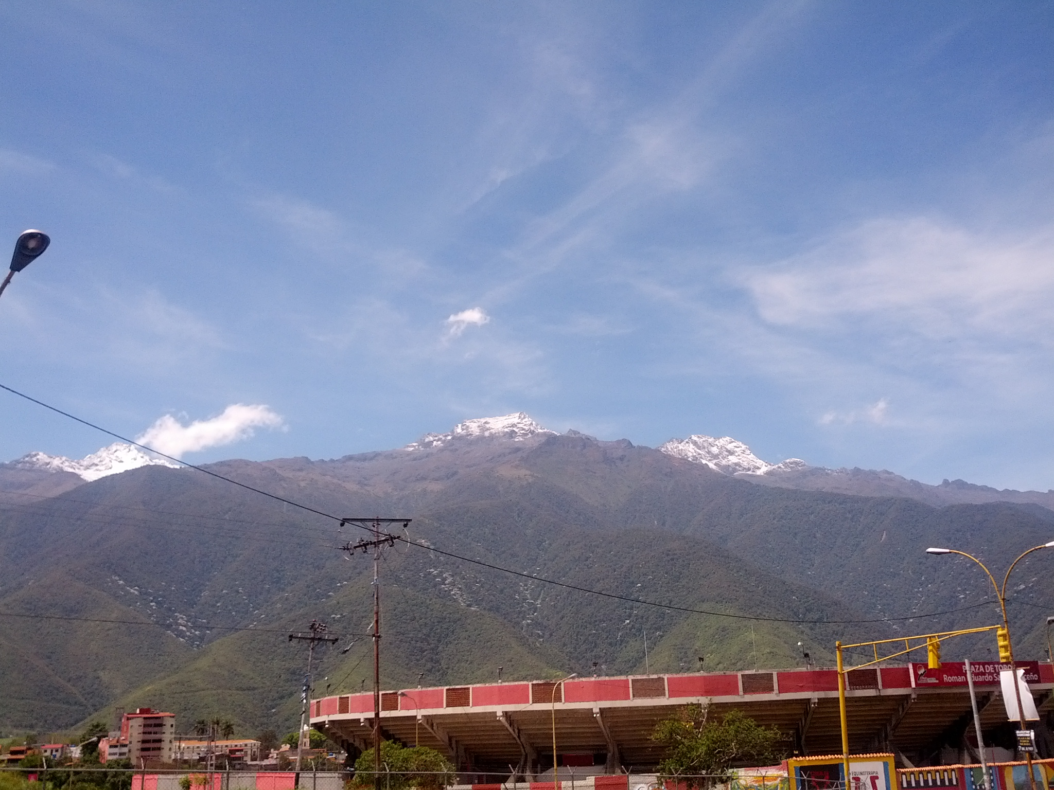 Vista de algunos picos nevados de Mérida, desde la avenida Las Américas. Puede verse parte de la Plaza de Toros.